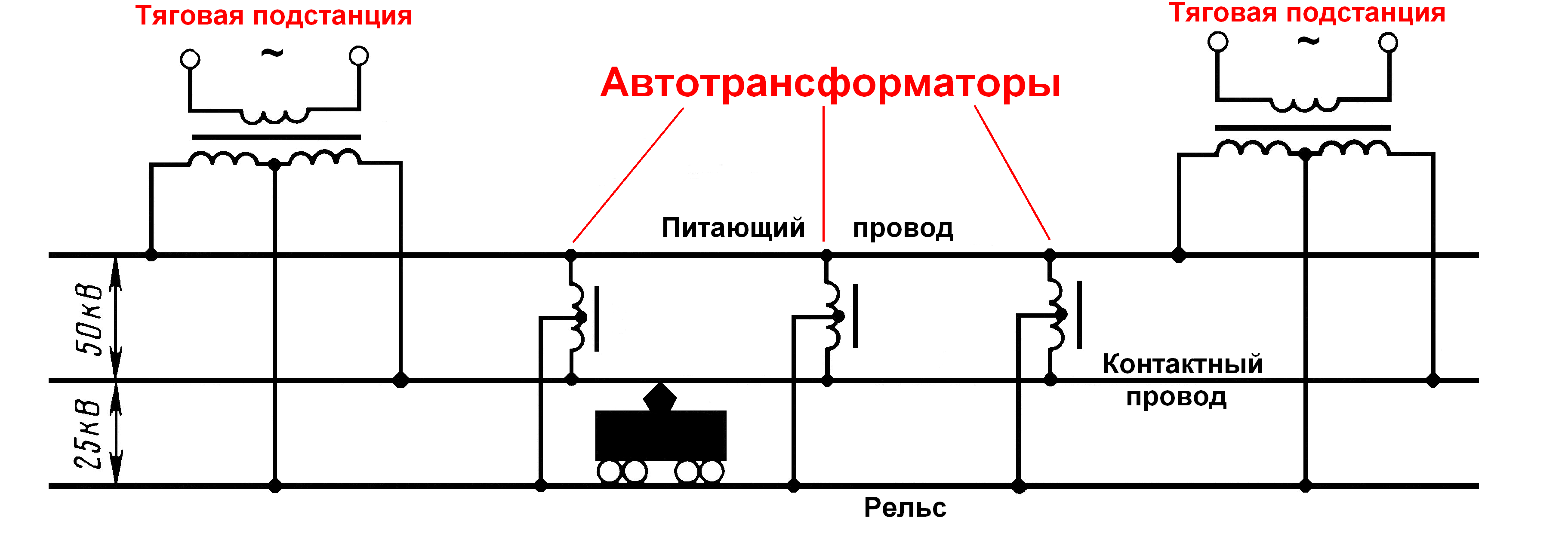 Электрификация два по двадцать пять киловольт